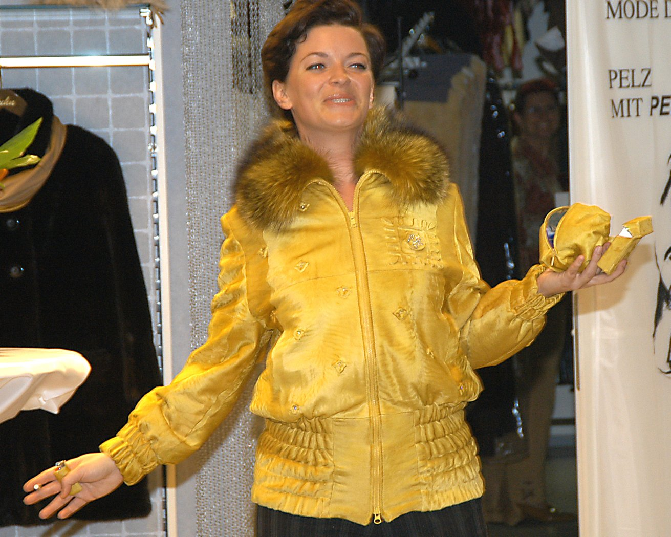 Modenschau der Firma Pelzmodelle Kuhn, Düsseldorf. Anlässlich des hundertjährigen Firmenjubiläums. Buttercup gefärbte Swakara Persianerjacke mit gefärbtem Bluefrost Fuchskragen, Prägetechnik mit Strass und Persianertasche (Design: Karin Scholz, Düsseldorf) und Persianer-Zigarettenetui und Persianer-Feuerzeug (Gesamtdesign Kuhn).